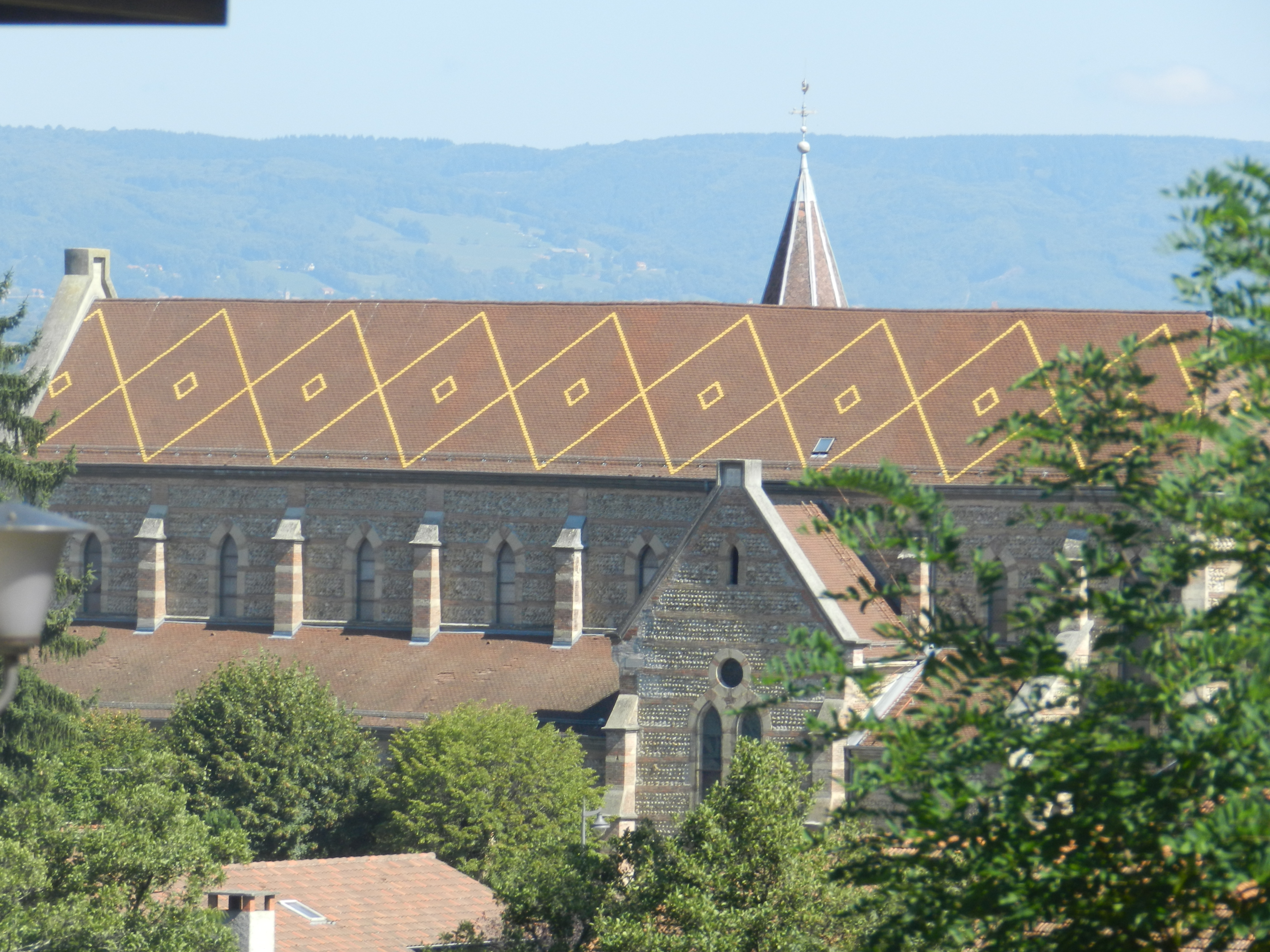 Église Saint-Étienne de Saint-Étienne-de-Saint-Geoirs, (Inscrit, 1995)